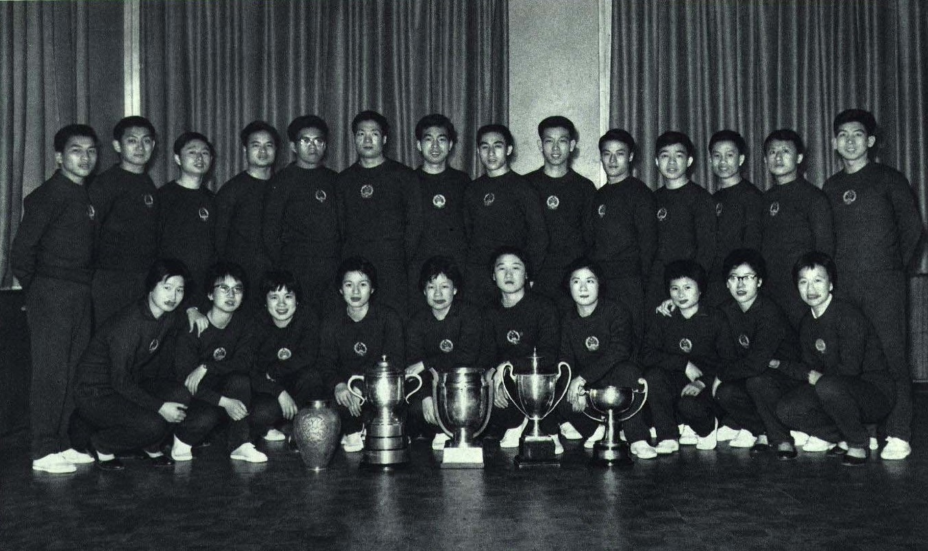 1965-7 1965年 第28届世锦赛 中国乒乓球队全体队员